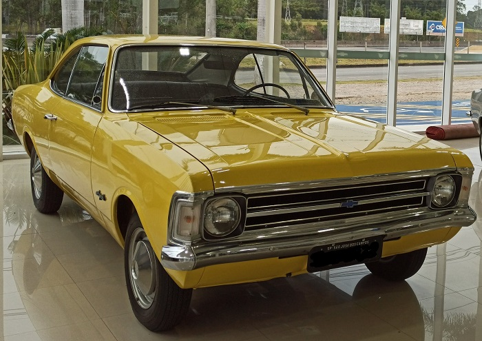 Chevrolet Opala Especial Amarelo Orion 1973